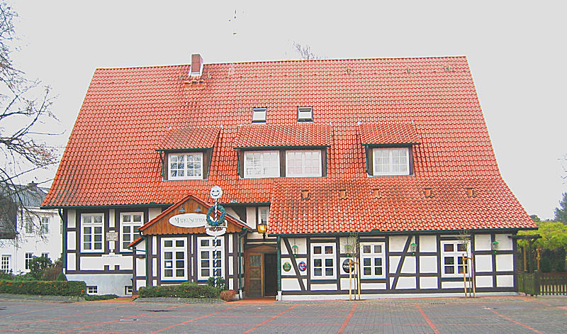 Ackerbürgerhaus am Alten Markt in Rahden. Geburtshaus von Professor Langhorst. Heute Gasthaus Marktschänke. This image shows a heritage building in Germany, located in the North Rhine-Westphalian city Rahden (no. 31).